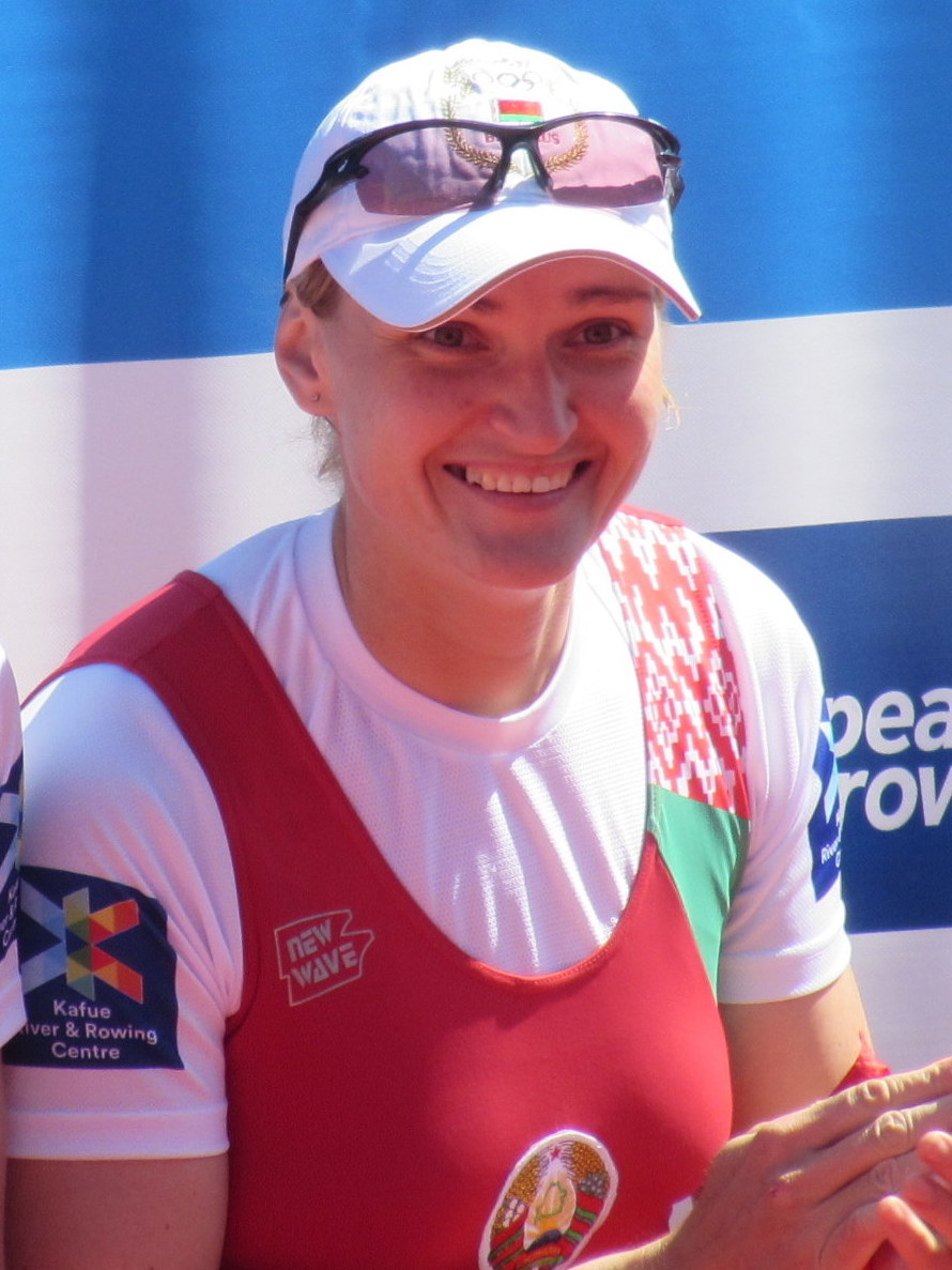 Julija Bitschyk, Ruder-EM 2016